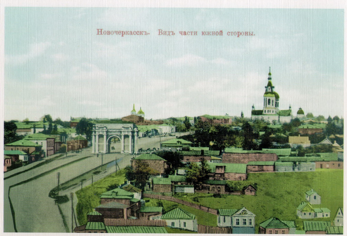 Вид Новочеркасска с южной стороны на дореволюционной открытке